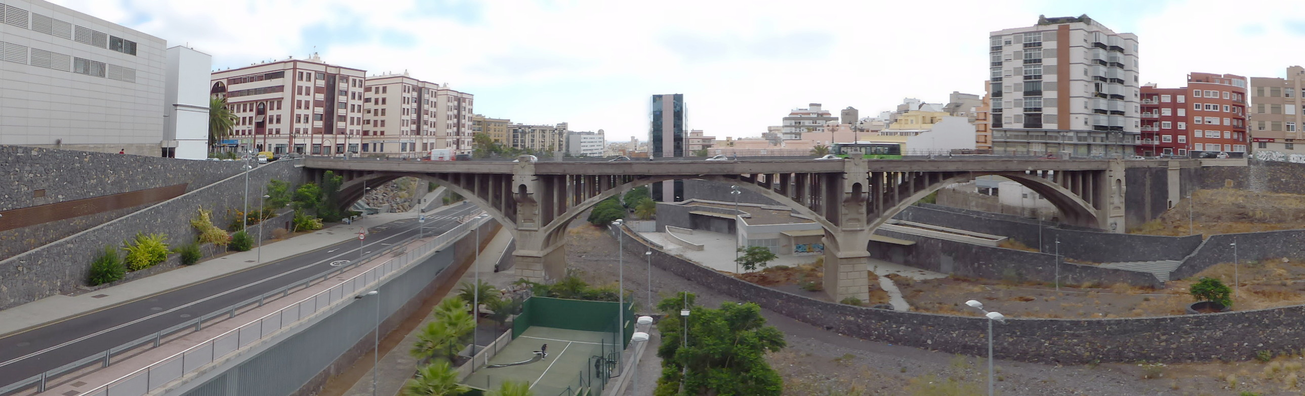 Puente Galceran über den Barranco de Santos in Santa Cruz de Tenerife, von Westen gesehen.